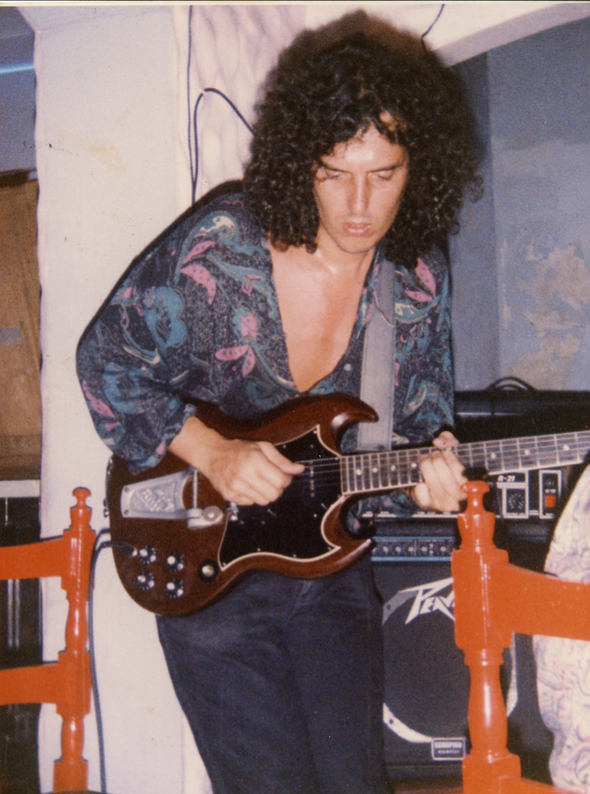 SG Special 1968, Conejo en los 80's.